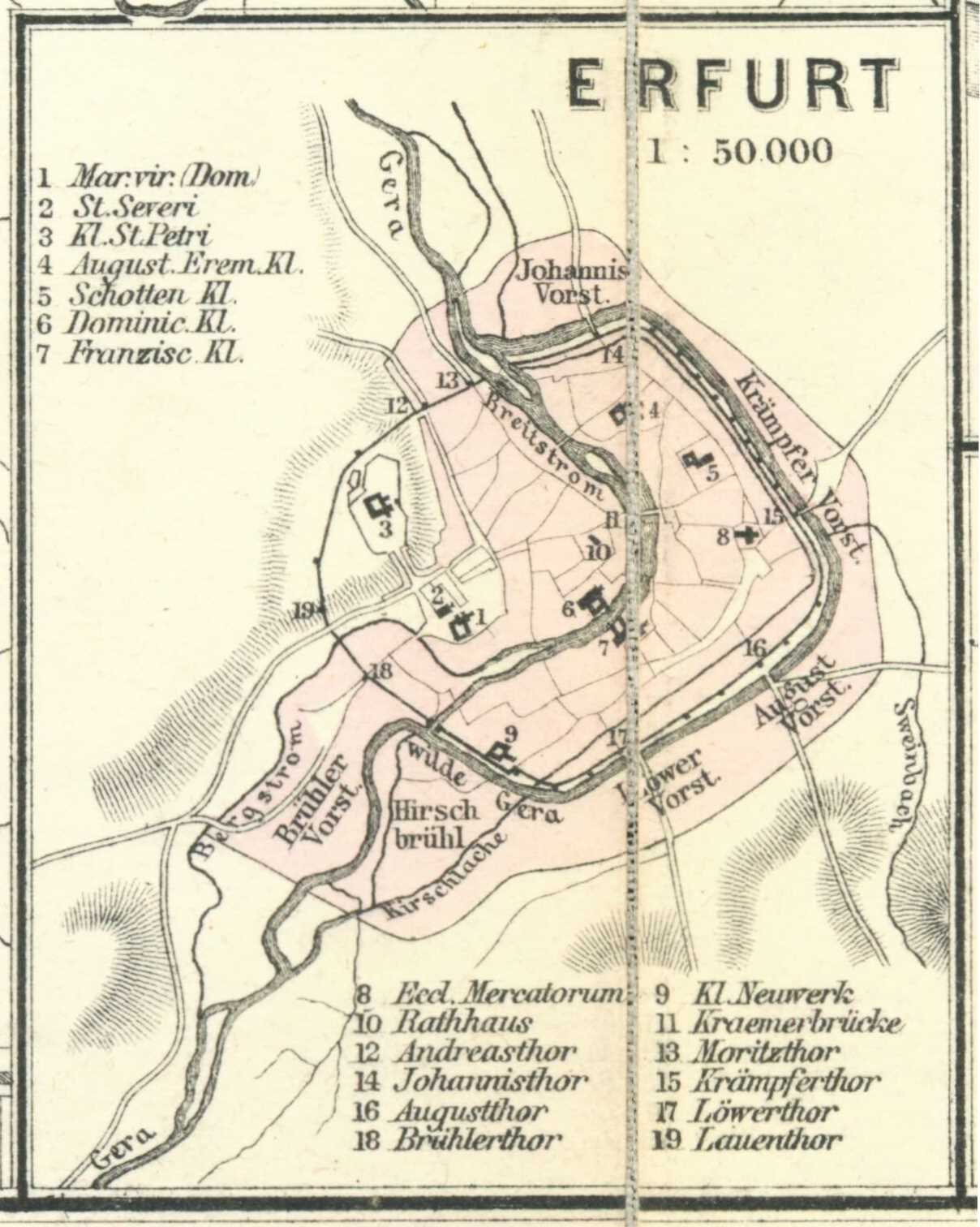 Erfurt gegen Anfang des XIII. Jahrhunderts